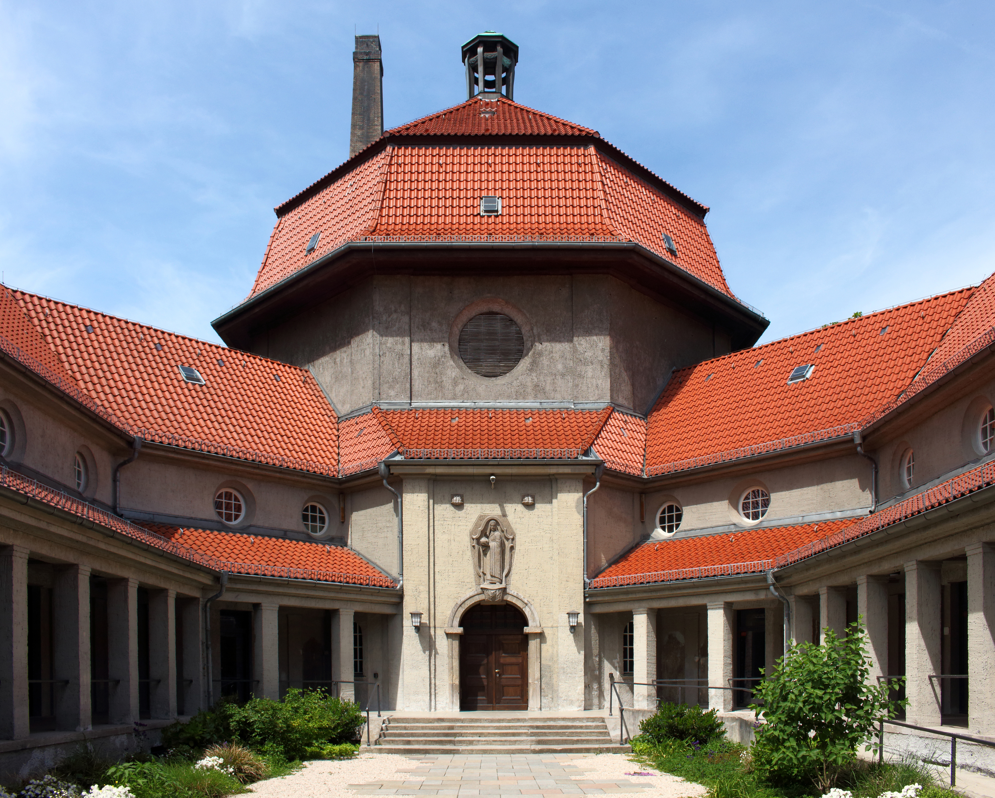 Innenhof des Krematoriums Berlin-Wedding